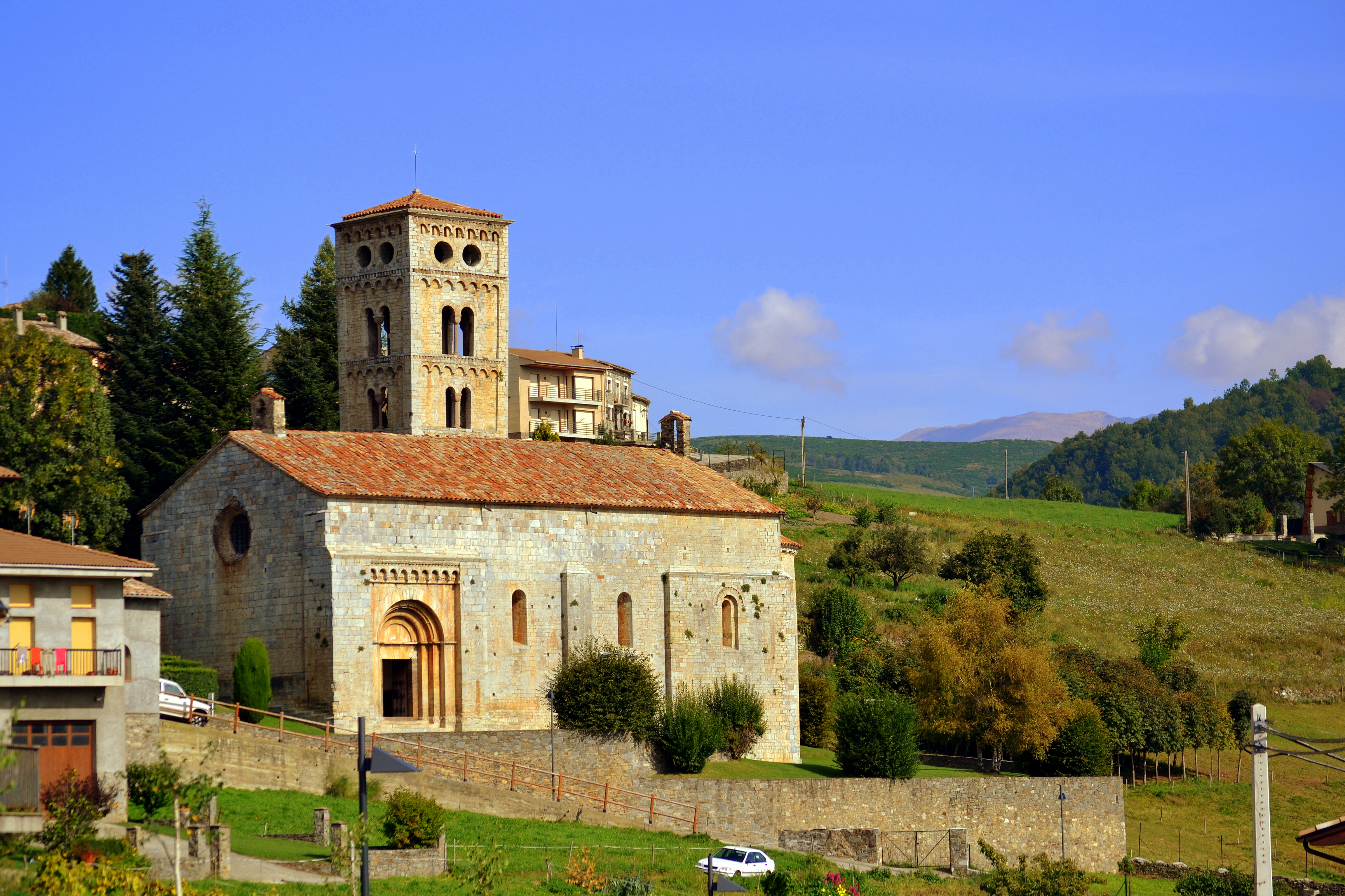 Església de Santa Cecília de Molló